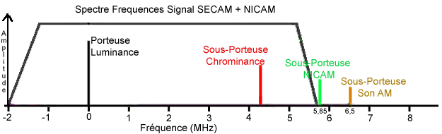 Aperçu spectre SECAM-NICAM